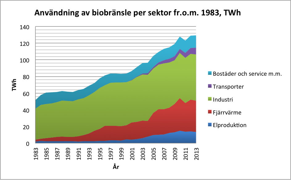 Denna bild beskriver användningen av biobränsle per sektor fr.o.m. 1983 i TWh, data är tagen ifrån